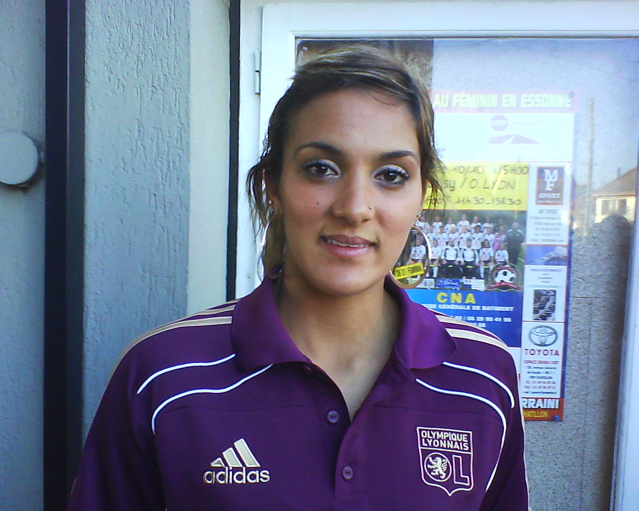 Louisa Necib